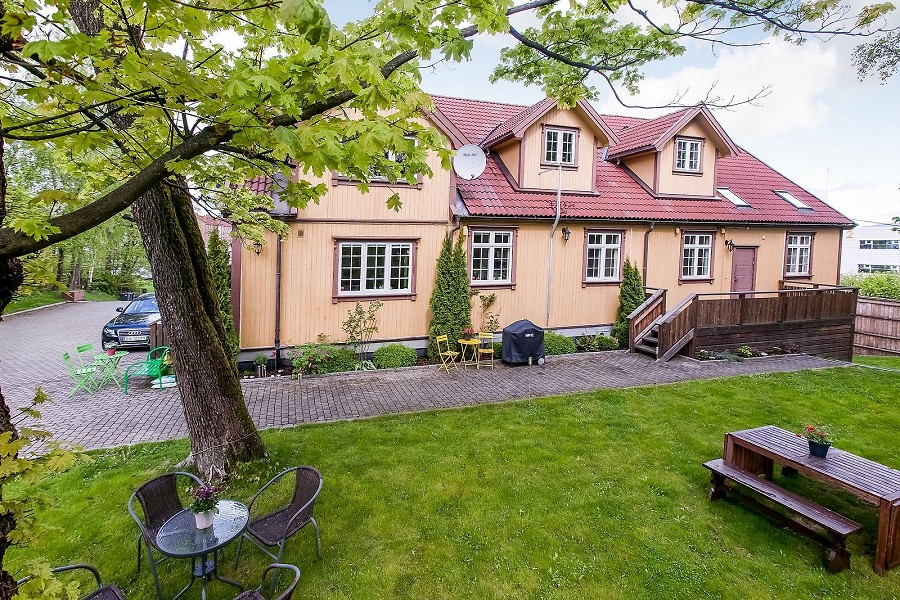 Klosterheim fotografert sommeren 2015